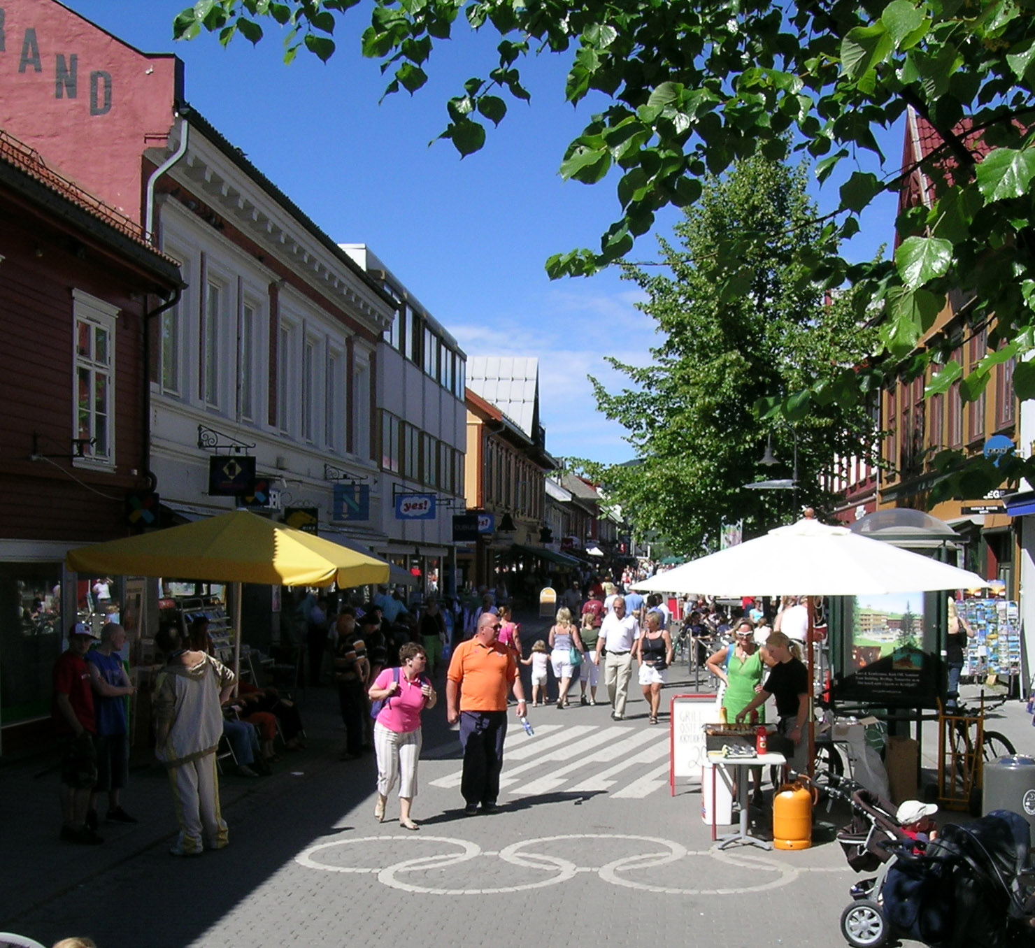 Storgata, Lillehammer, Norway